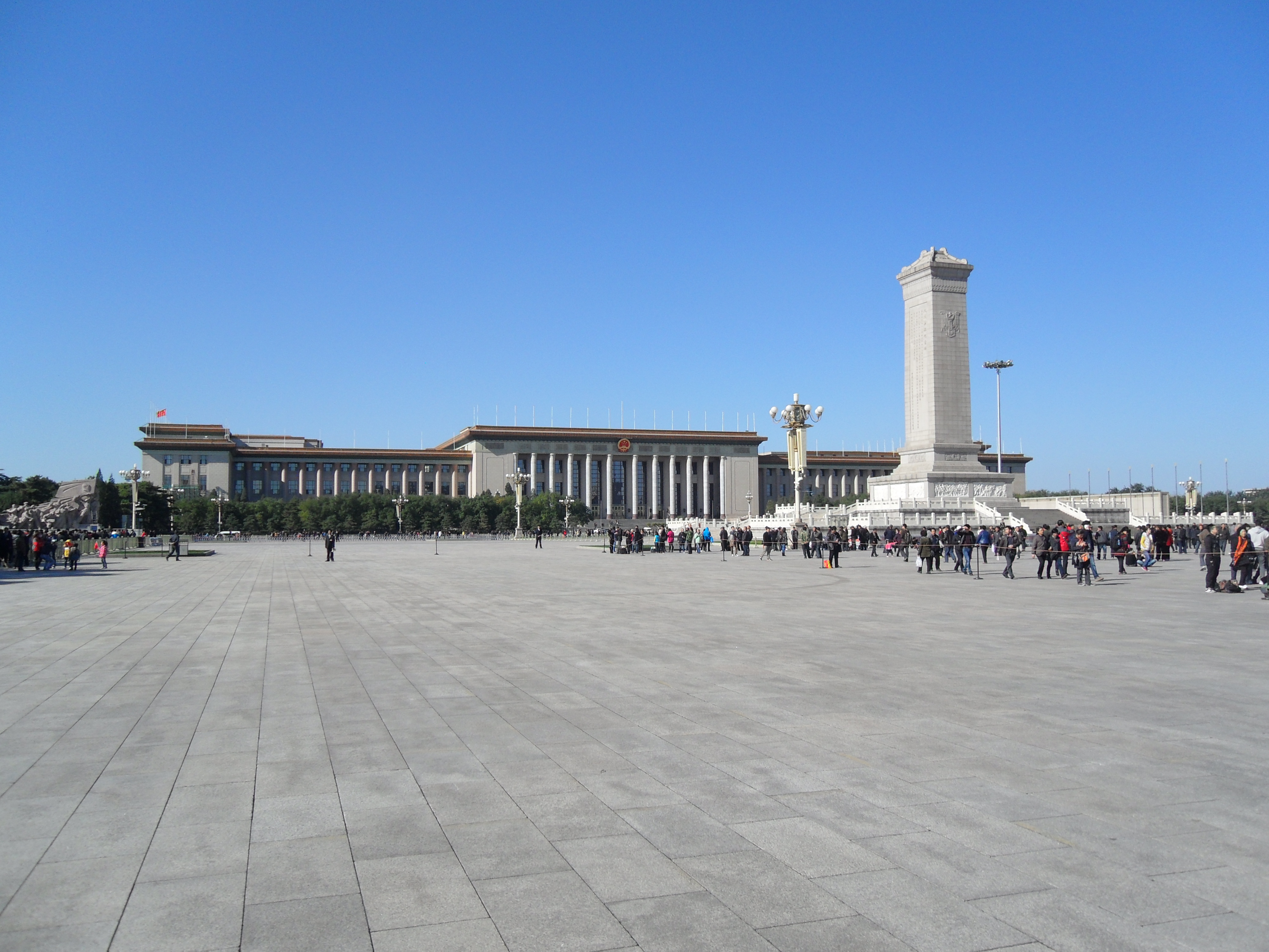 Große Halle des Volkes am Platz des Himmlischen Friedens